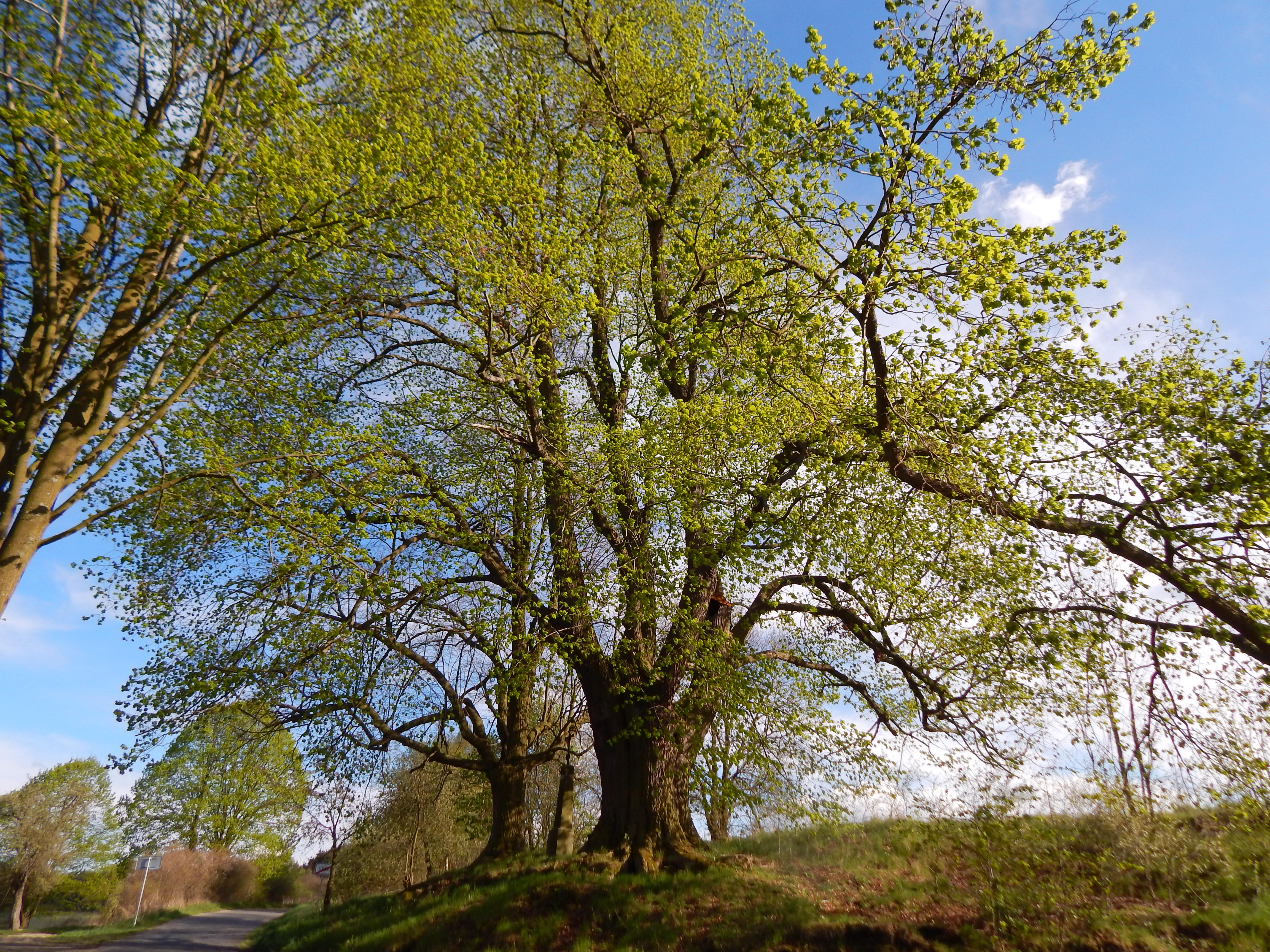 Více než dvěstěletá lípa velkolistá roste při polní ceste z Vrčeně do Tojic u křížku